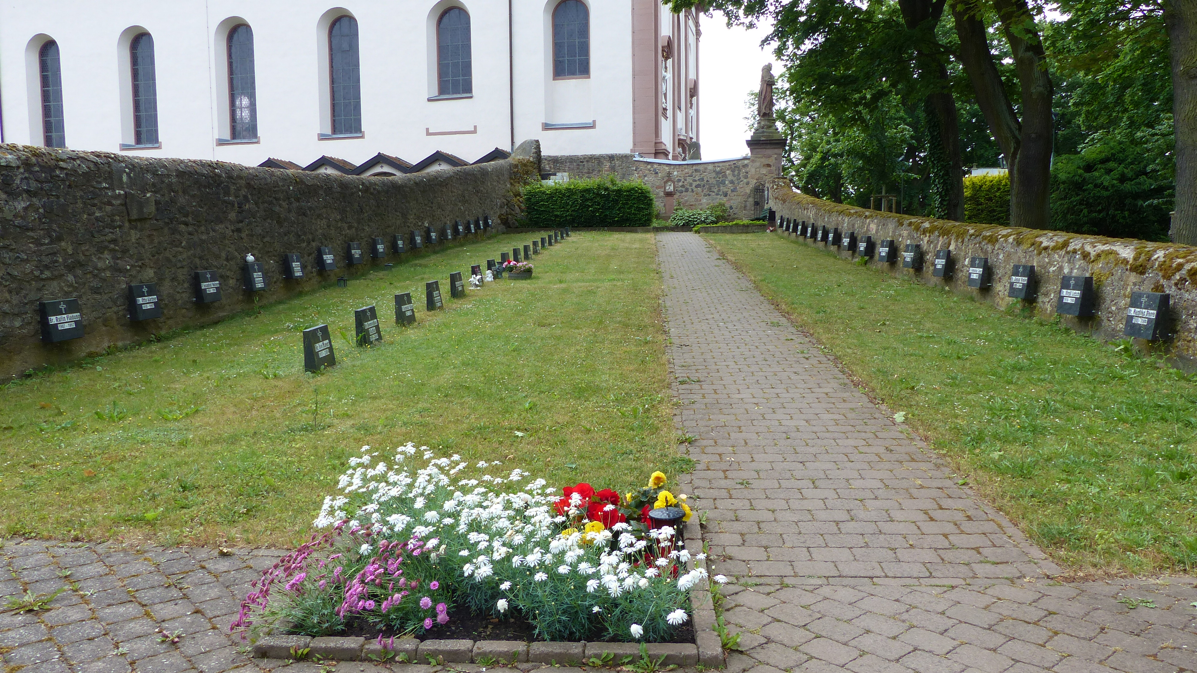 Franziskanerkloster Frauenberg, Fulda